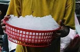 עובד בחנות דגים מחזיק דלי קרח. זכויות היוצרים על התמונה הן שלי.